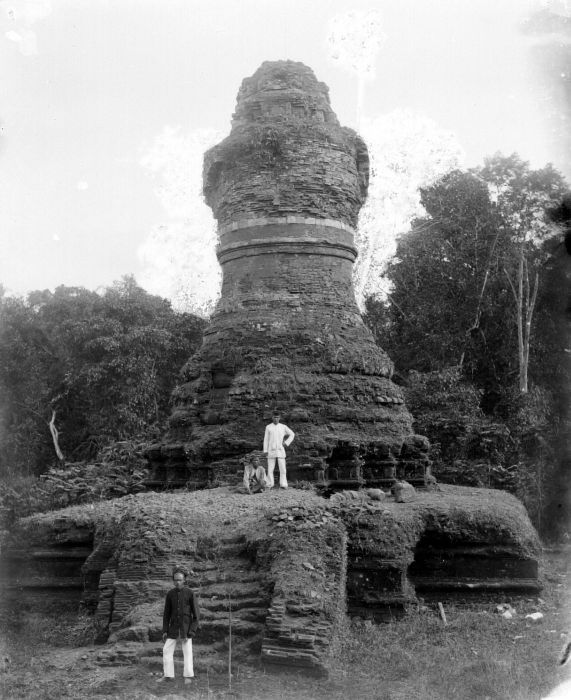 Negatief. Stoepa te Moeara. Stoepa te Moeara